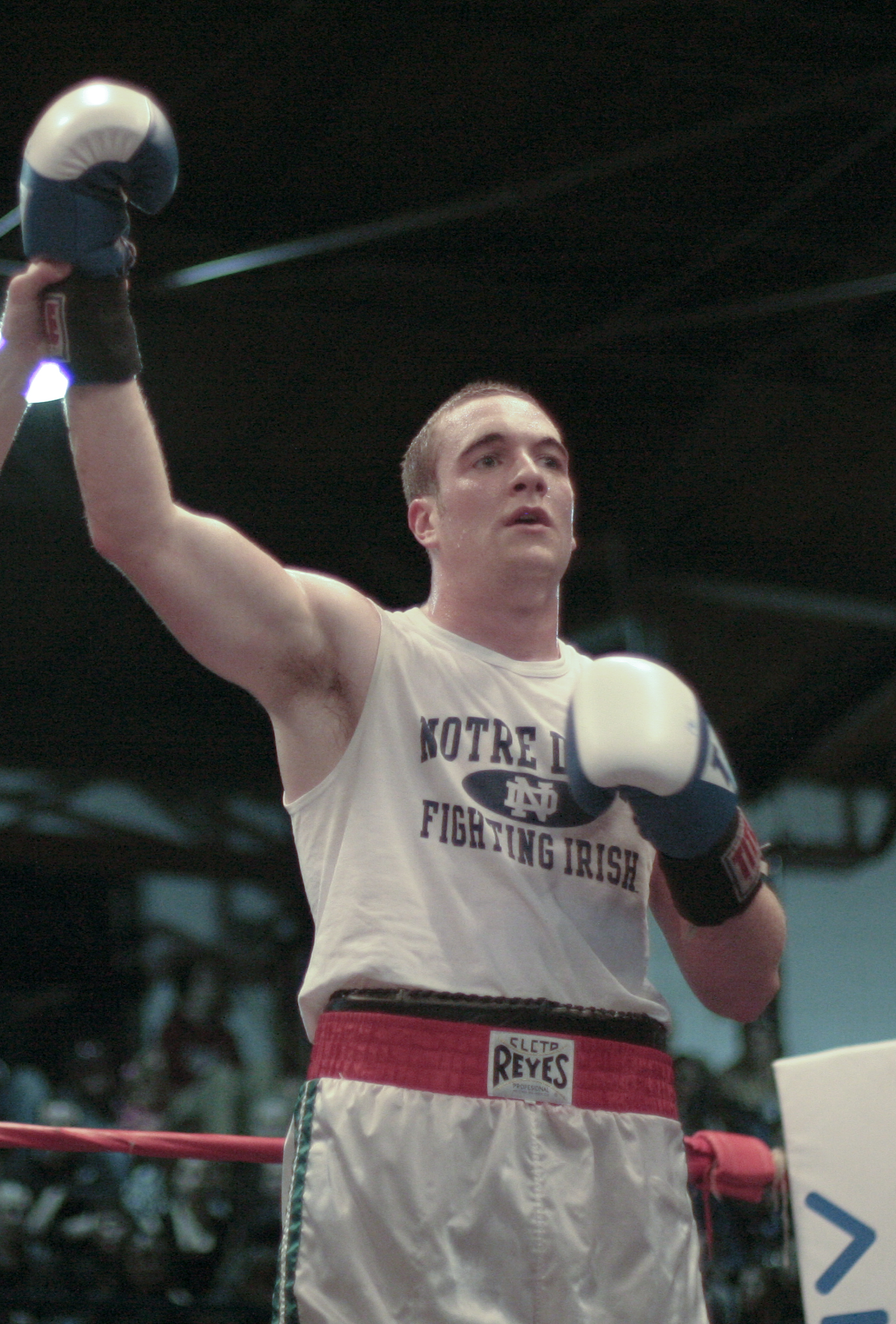 Chicago Golden Gloves - Saturday April 4 2009 178SN Mike Lee Matador RSC3 Isidro Medrano Aurora